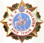 Узбекский орден "Амир Темур" (тип 1)